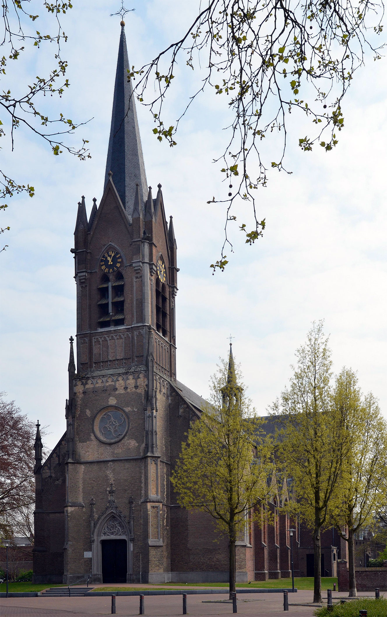 Rijksmonument te Mierlo, Nederland. Luciakerk, Pastoor de Winterstraat 19, Mierlo